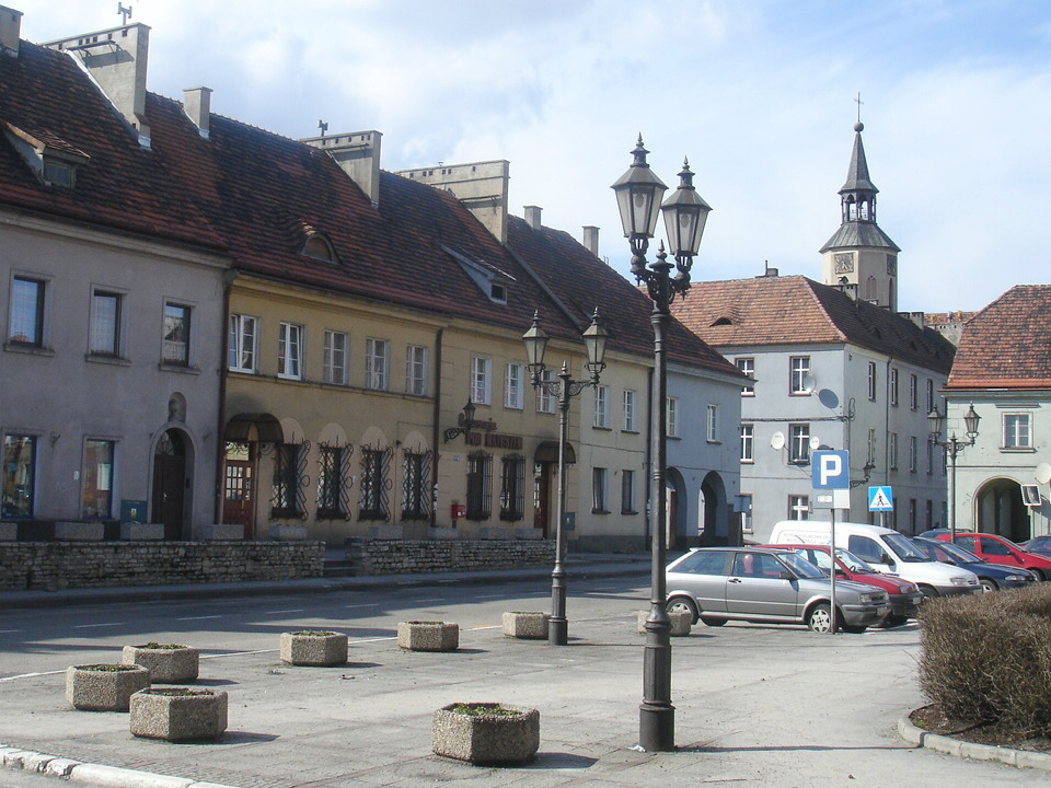 Pyskowice - układ urbanistyczny o owalnym układzie z położonym centralnie rynkiem (zabytek nr A/1015/69 z 18.02.69)